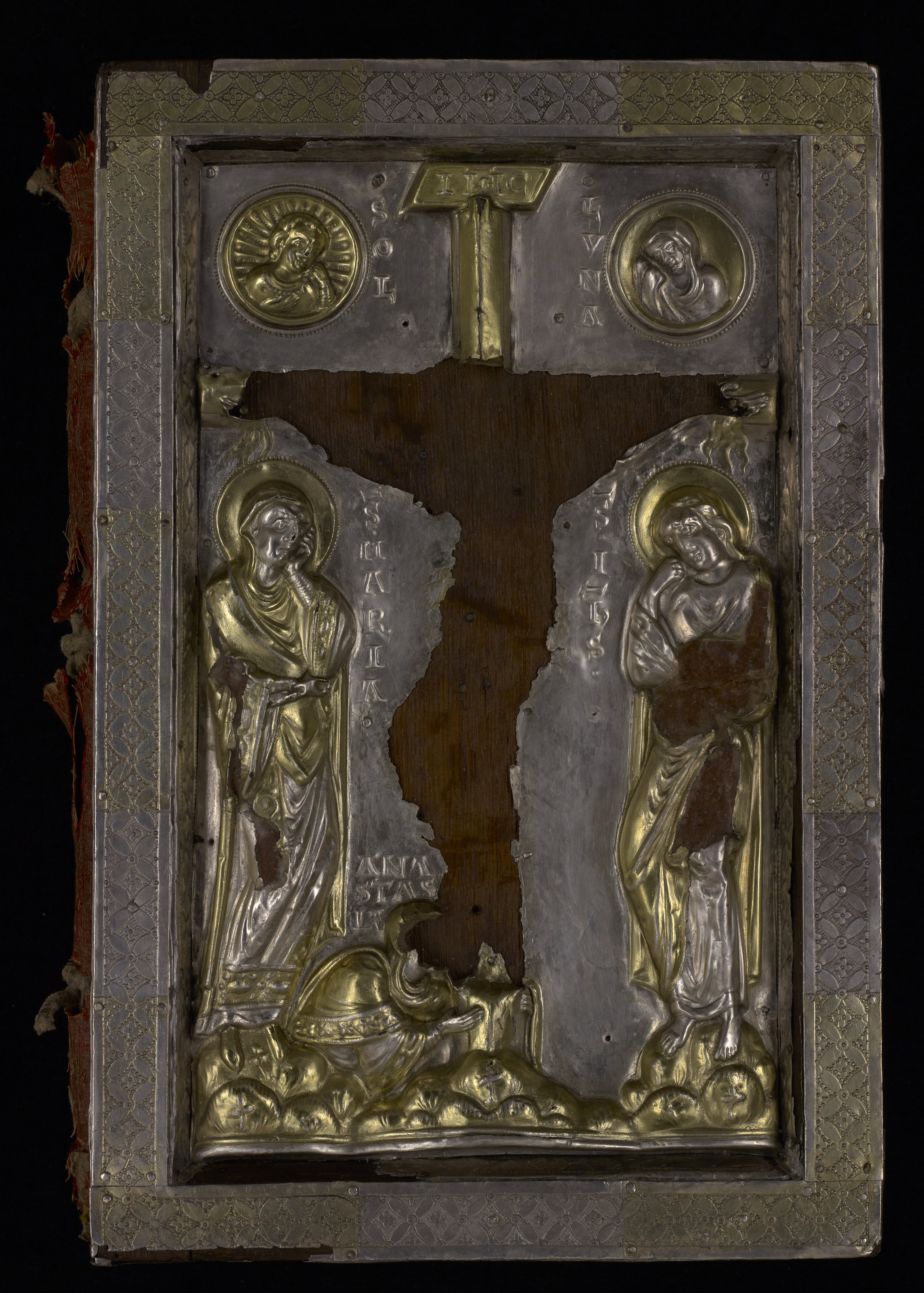 Front cover of Ewangeliarz Anastazji / Okładzina górna oprawy. U stóp krzyża wizerunek klęczącej Anastazji